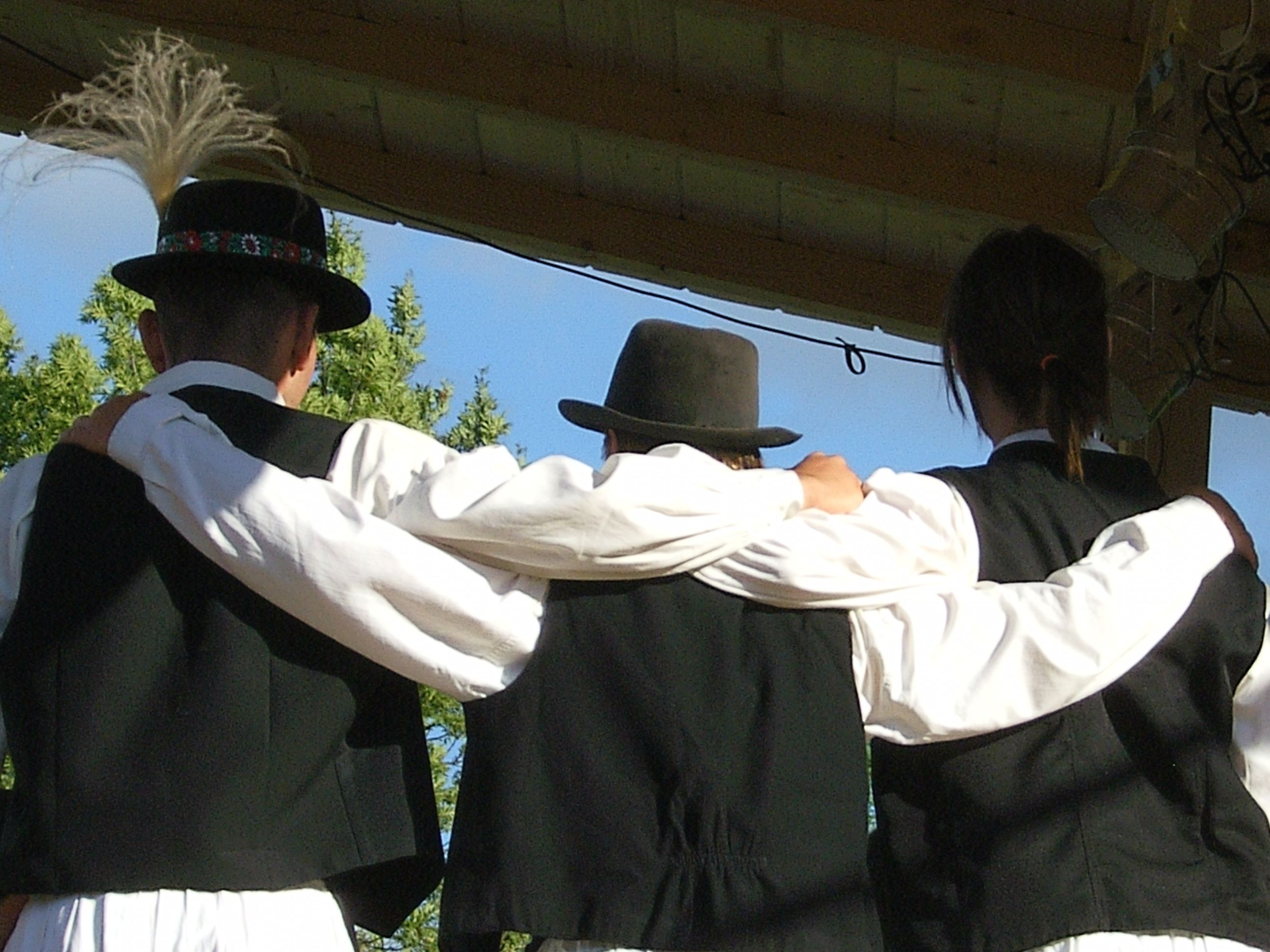 Valkói napok (Magyarvalkó, Erdély)